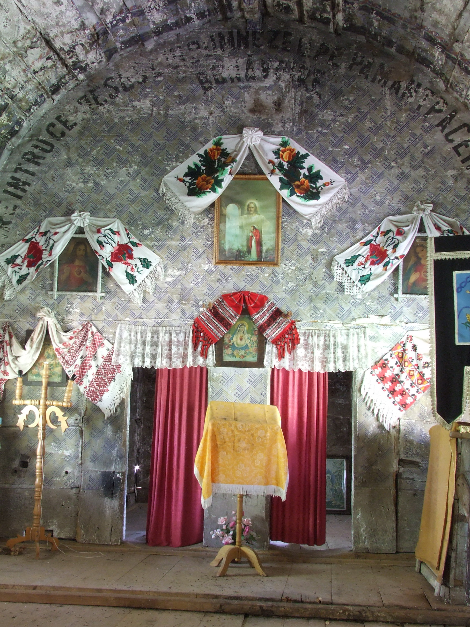 Biserica de lemn din Nadiş, judeţul Sălaj. Iconostasul.